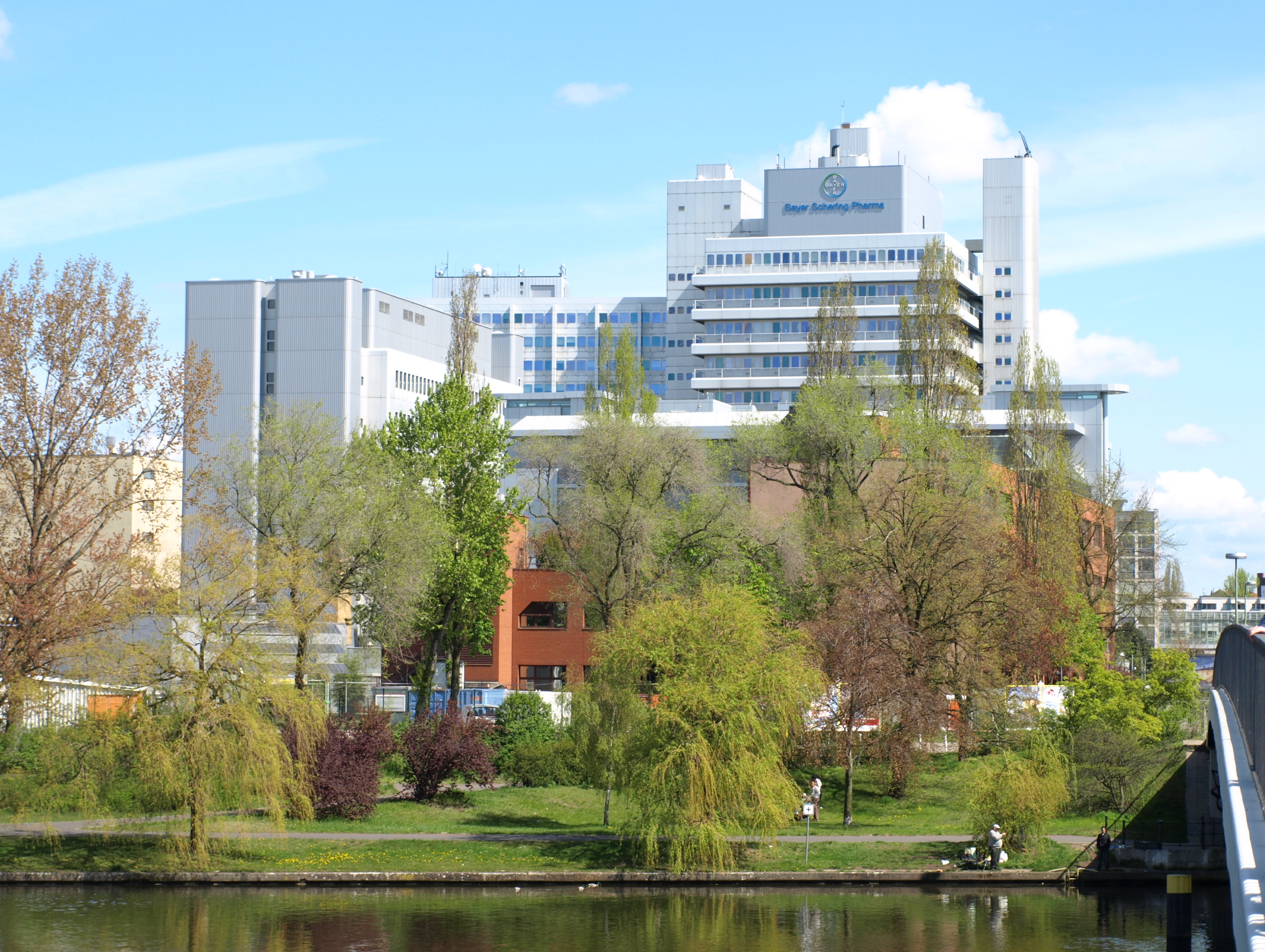 Bayer Schering Pharma